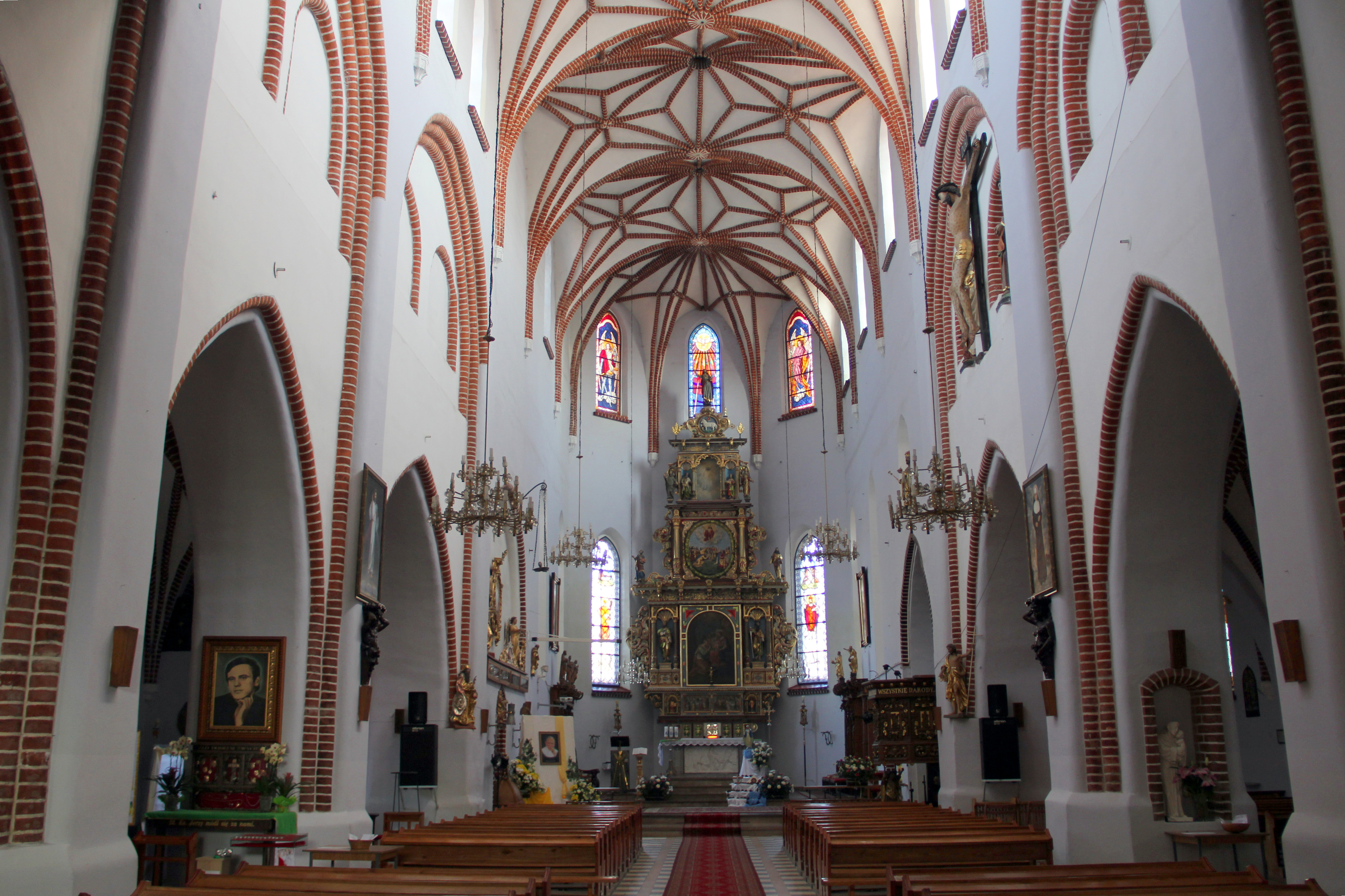 Bartoszyce. Nawa Główna w kościele św. Jana Ewangelisty i MB Częstochowskiej.